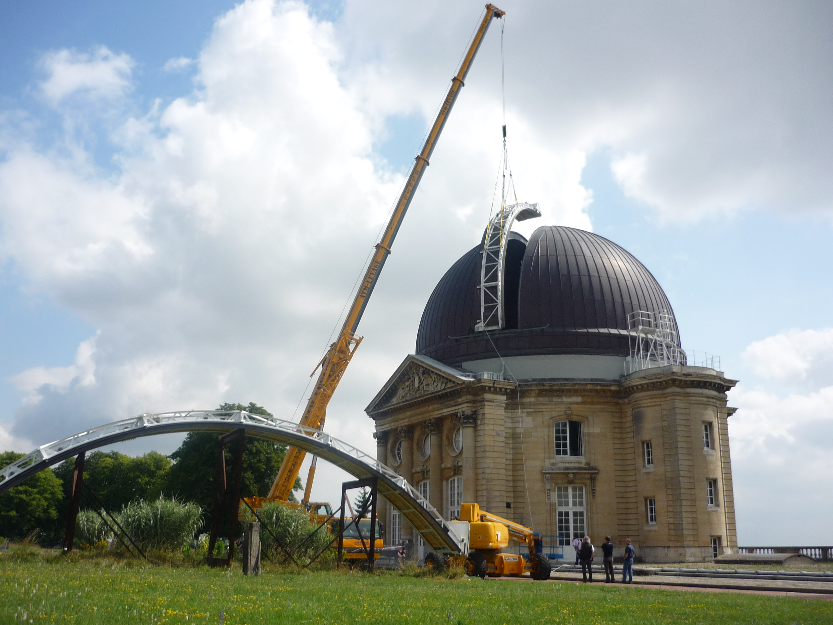 Montage des trappes d'observation de la Grande Coupole de Meudon. Début de la fin des travaux de réfection de la coupole.